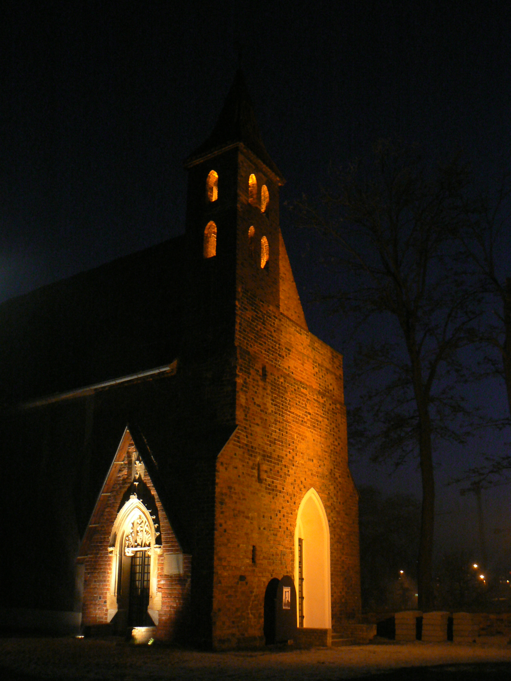 Lubin, kaplica zamkowa - iluminacja